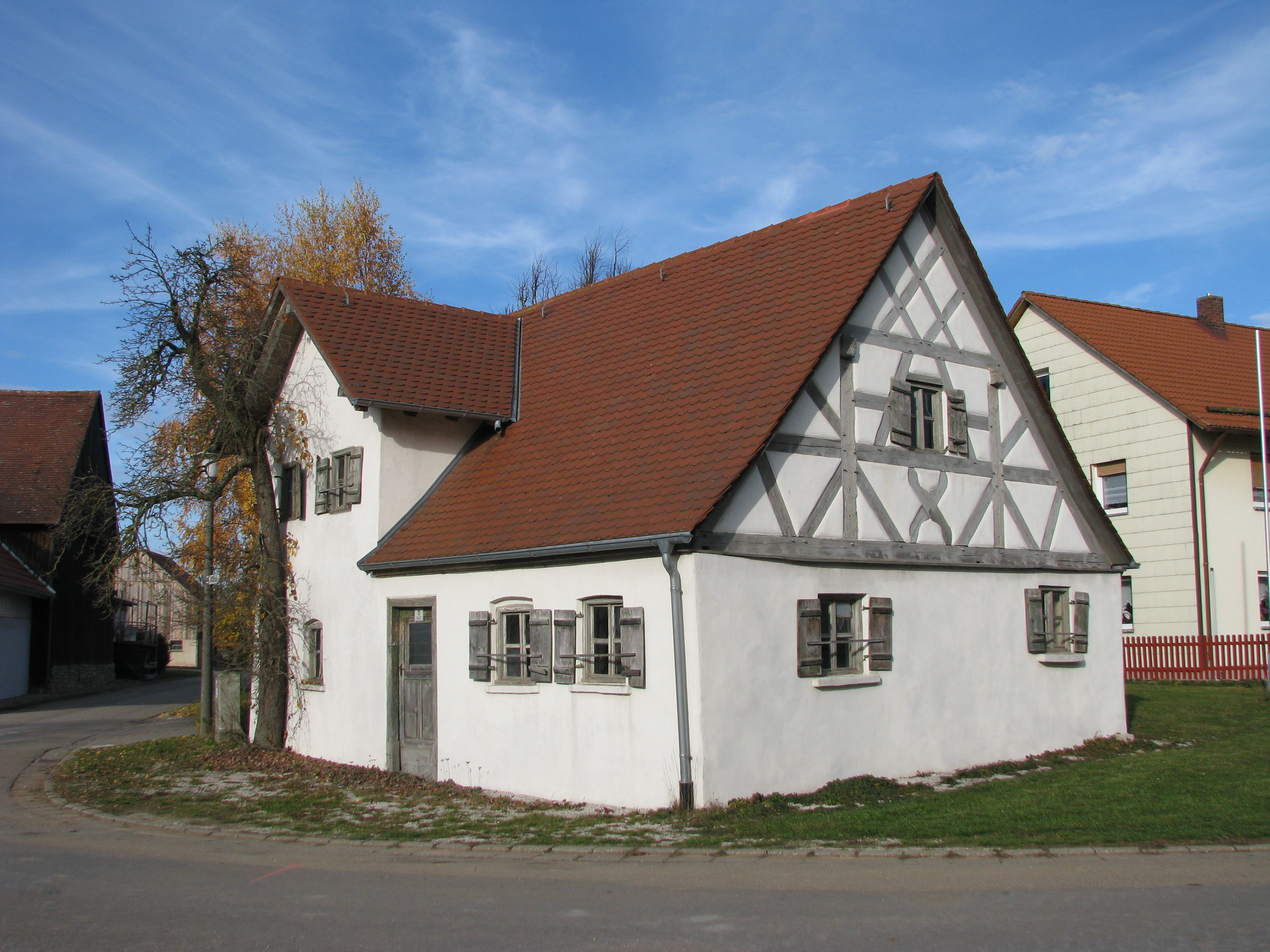 Österberg, Ortsteil von Greding im mittelfränkischen Landkreis Roth in Bayern, Baudenkmal Waldstraße 11